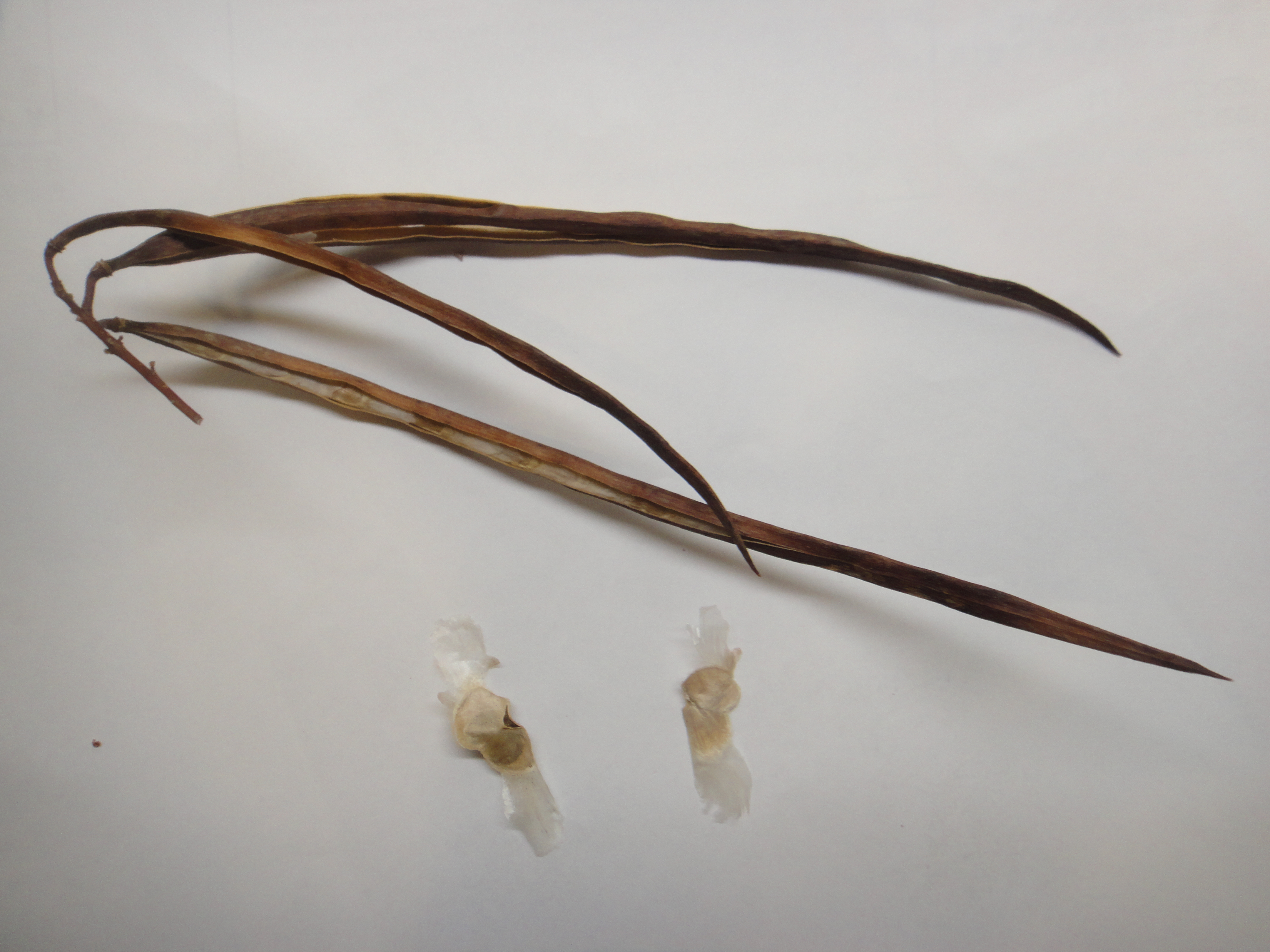 紅花風鈴木果實及種子